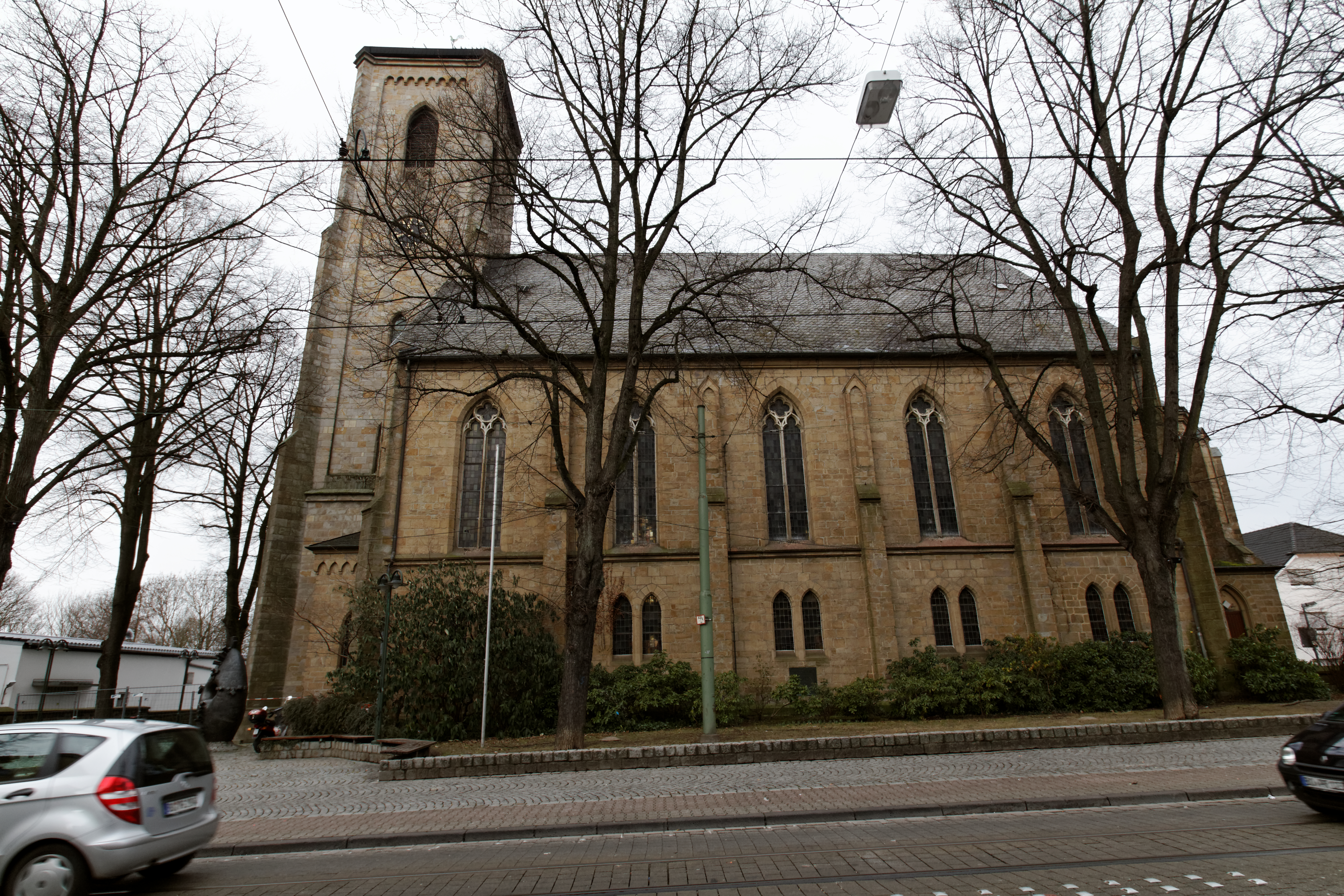 evangelische Kirche Bochum, Hattinger Str. 786; neogotische Emporensaalkirche aus Sandsteinquadern; 1877; Denkmalliste Bochum A 003